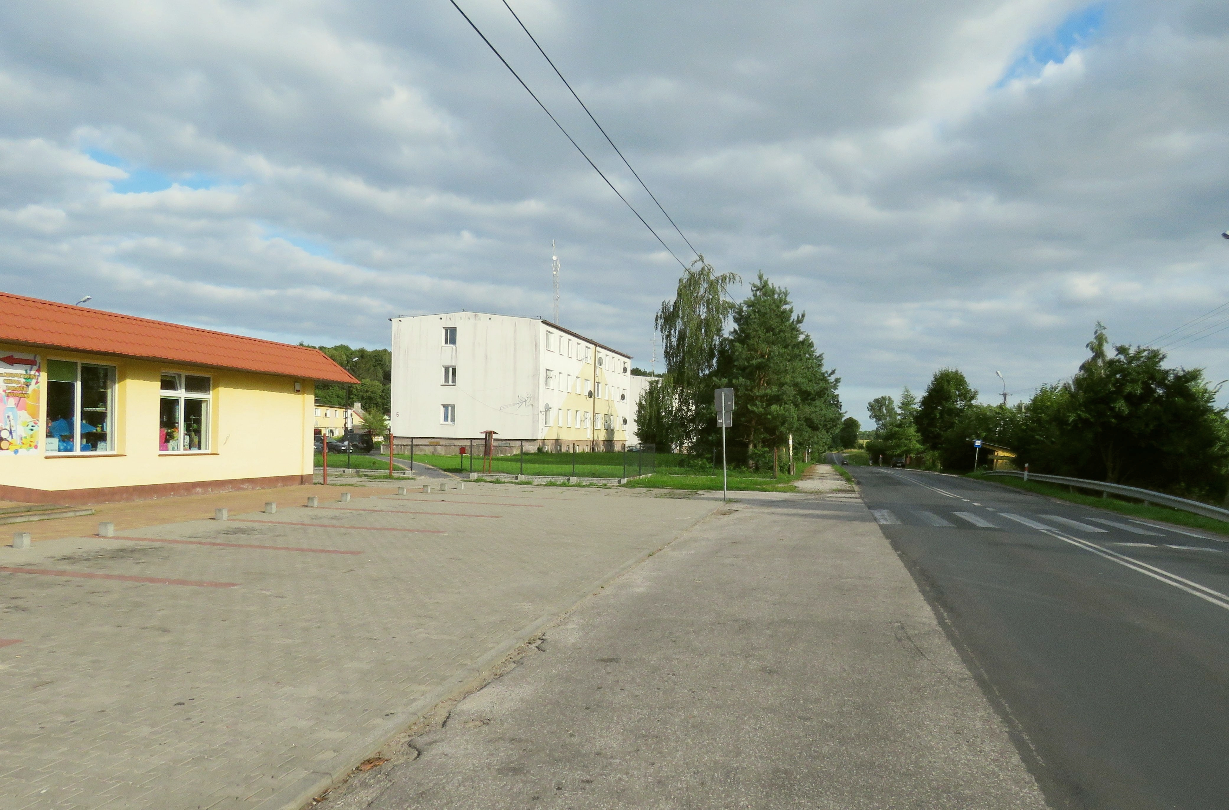 Mileszewy